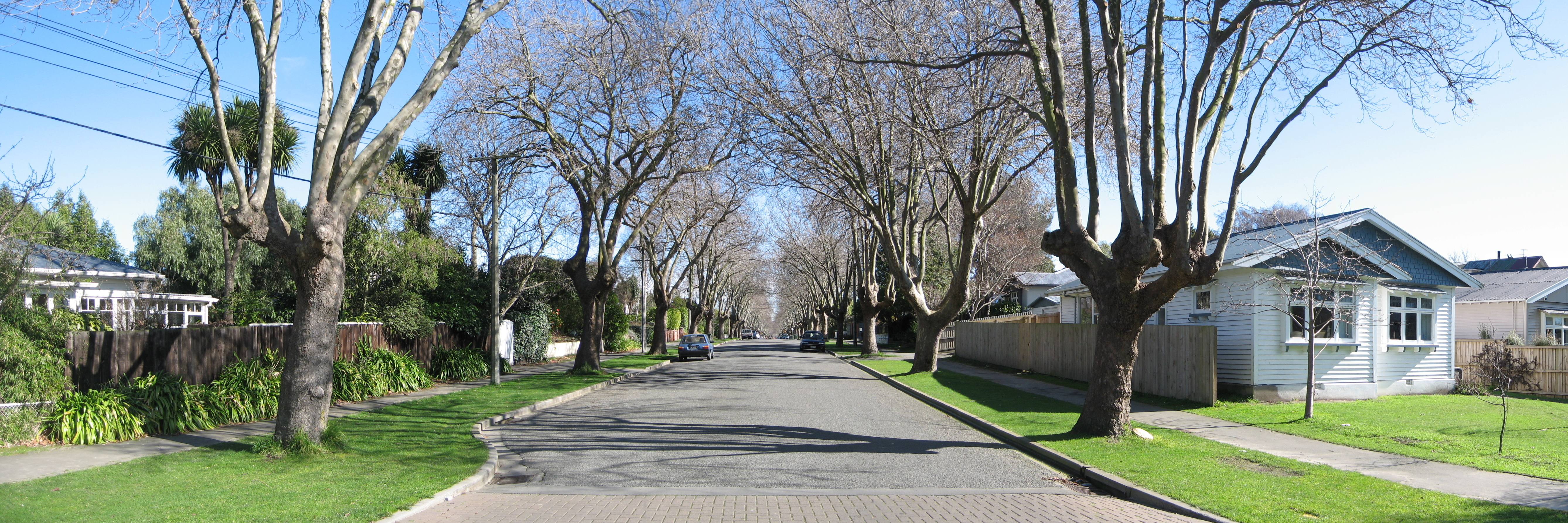 Fisher Avenue in winter, Beckenham, Christchurch, New Zealand